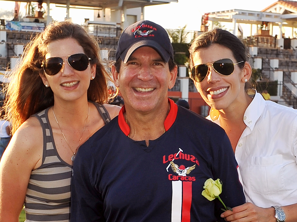 Víctor Vargas Irausquin con sus hijas, María Victoria y María Margarita